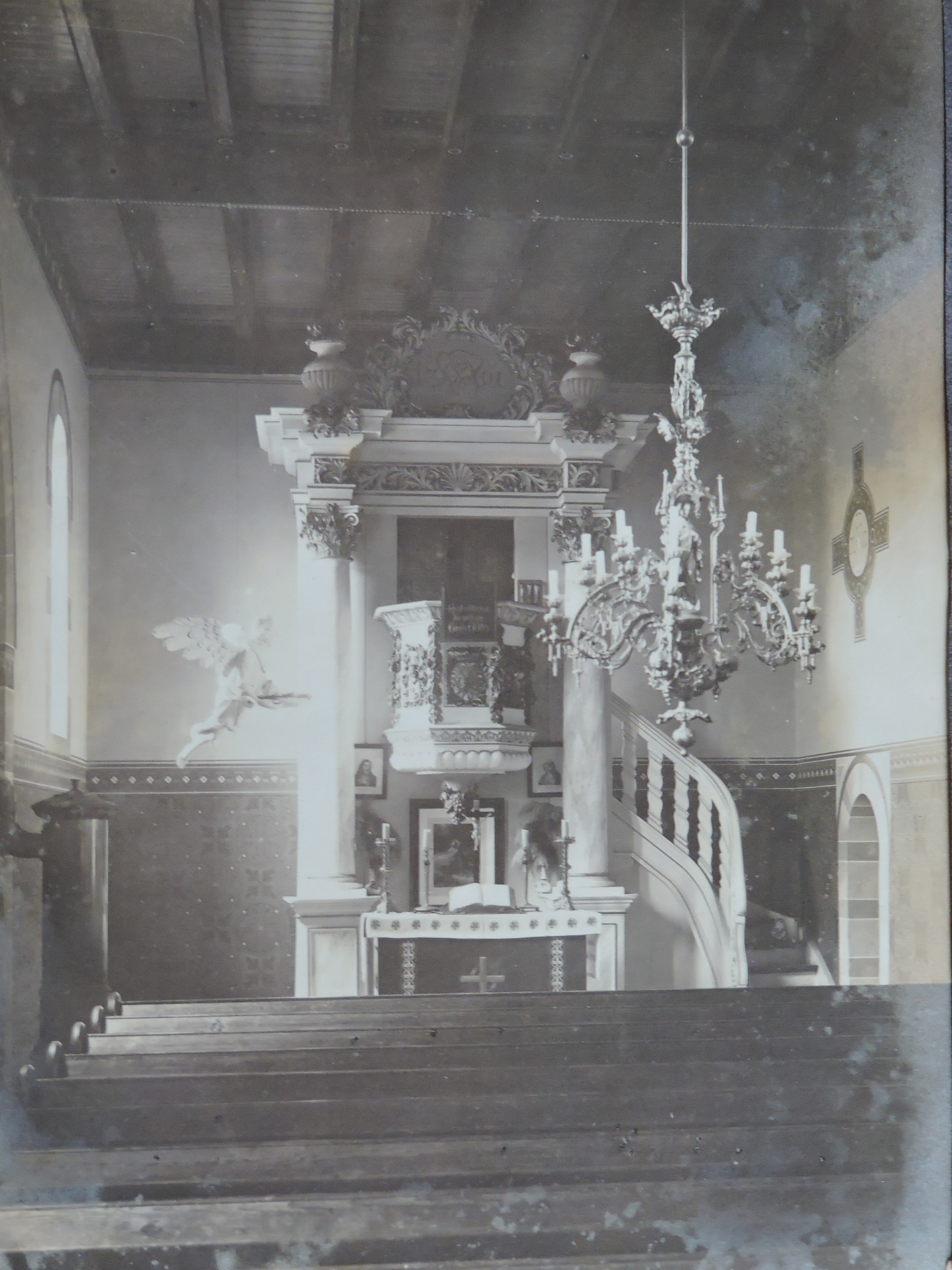 Kirche Nordgermersleben innen 1906